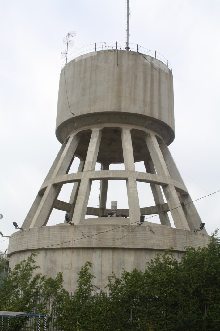 מגדל המים בנווה מגן